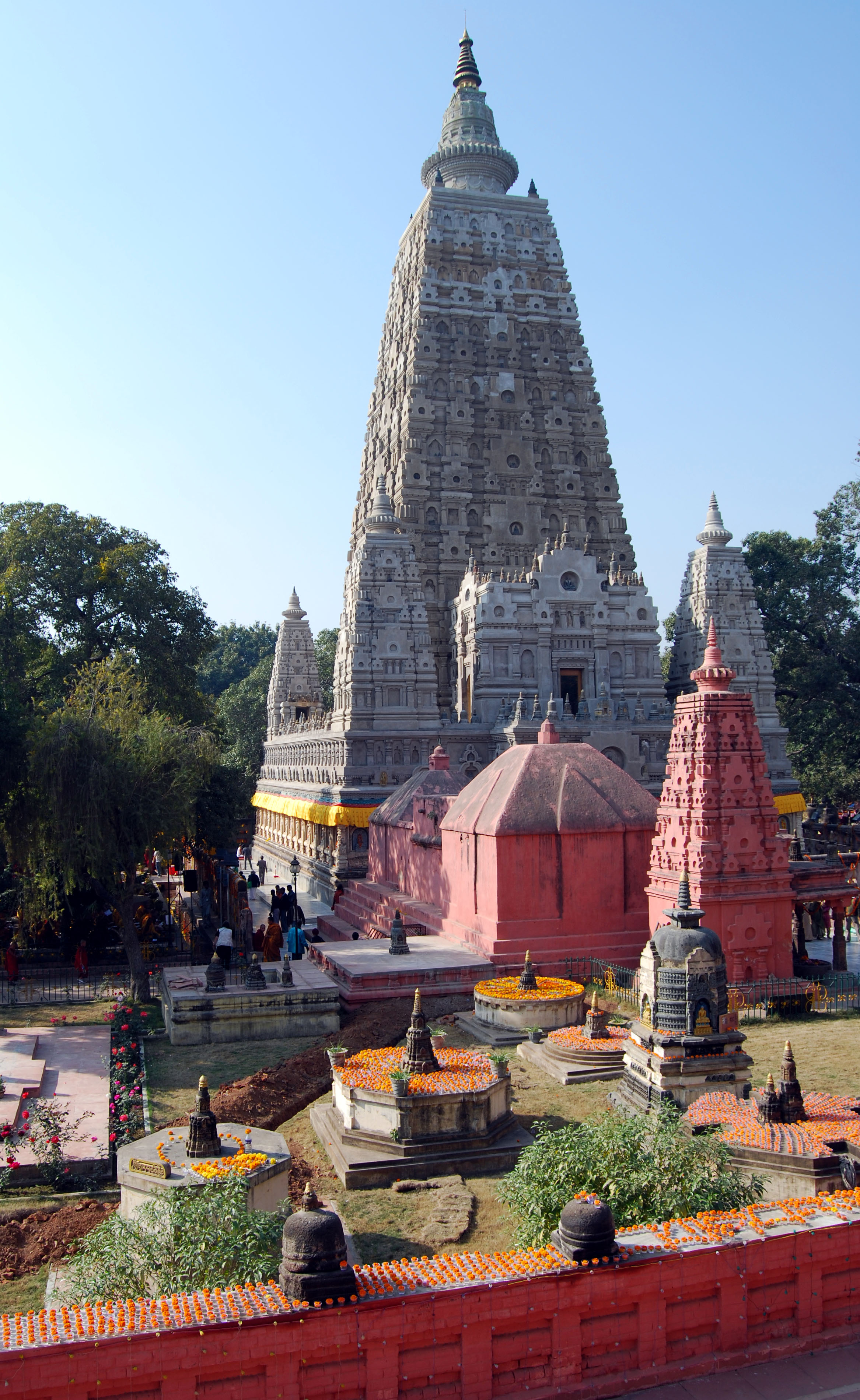 Mahavira Mahabodhi, Tibetan Buddhist temple in Bodhgaya, Bihar, India.